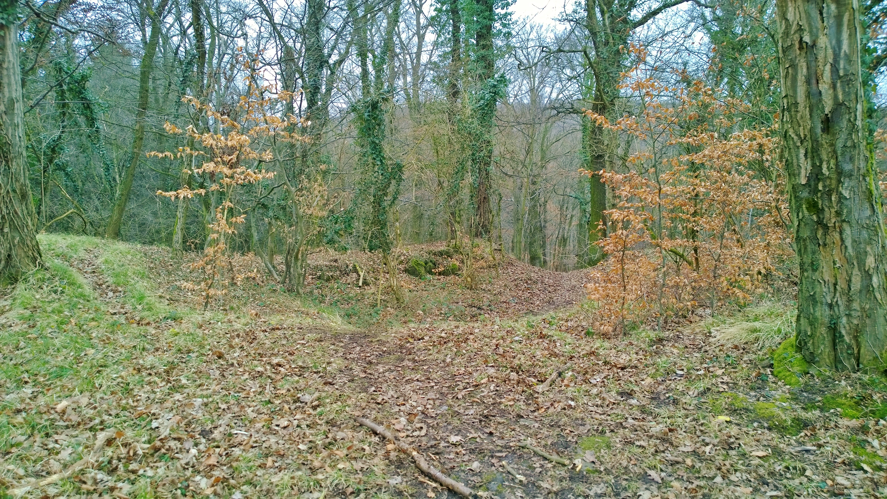 Burgstall Kugelburg, der quadratische Turmhügel